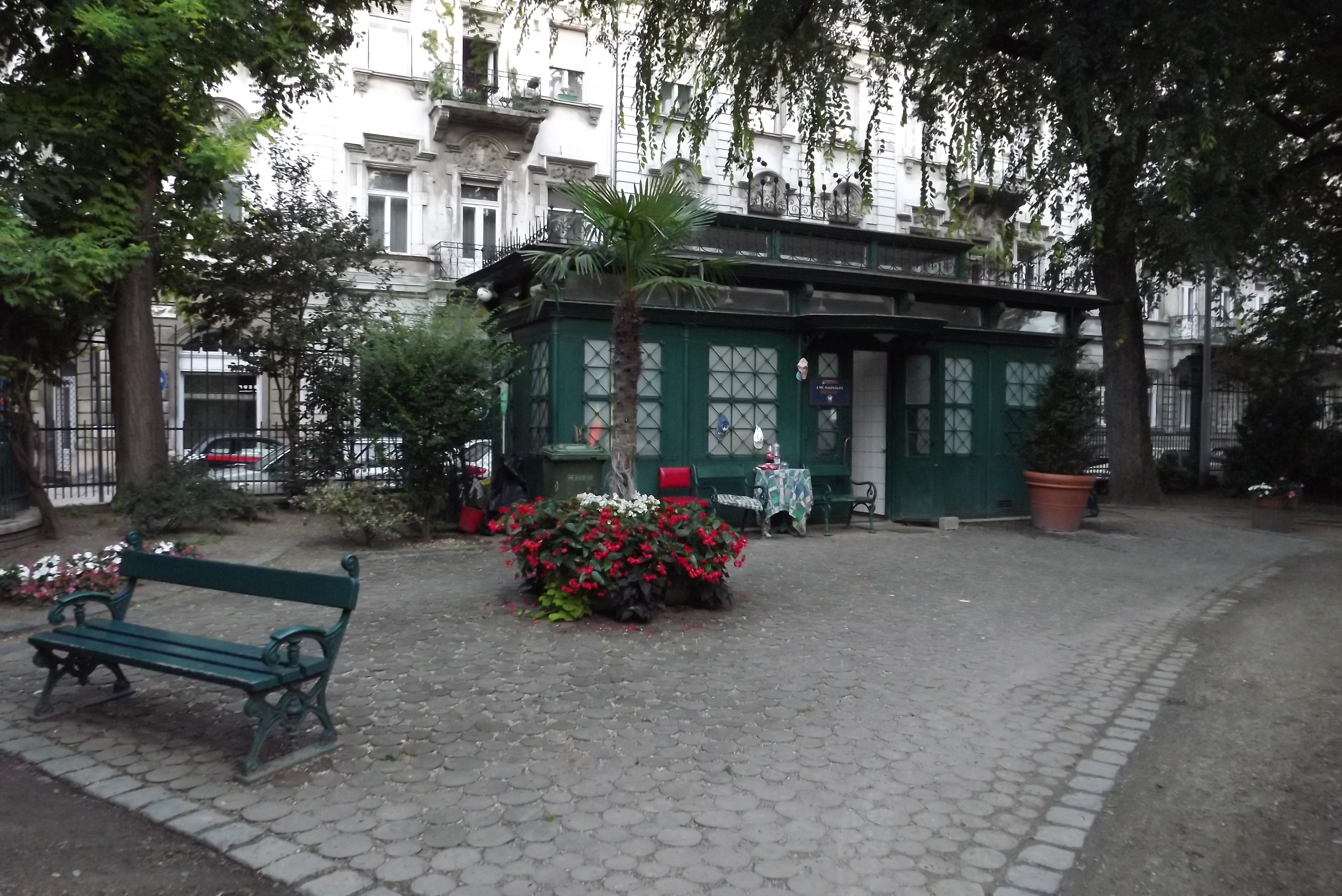 A budapesti Károlyi-kert 2014 augusztusában (Budapest, V. ker.)